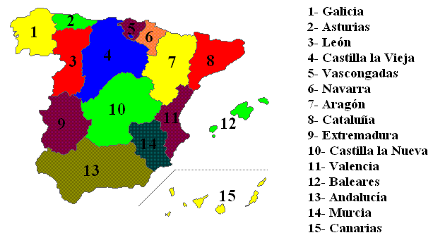 Regiones con derecho a nombrar un vocal en el Tribunal de Garantías Constitucionales de la II República, según Ley Orgánica del 14 de junio de 1933